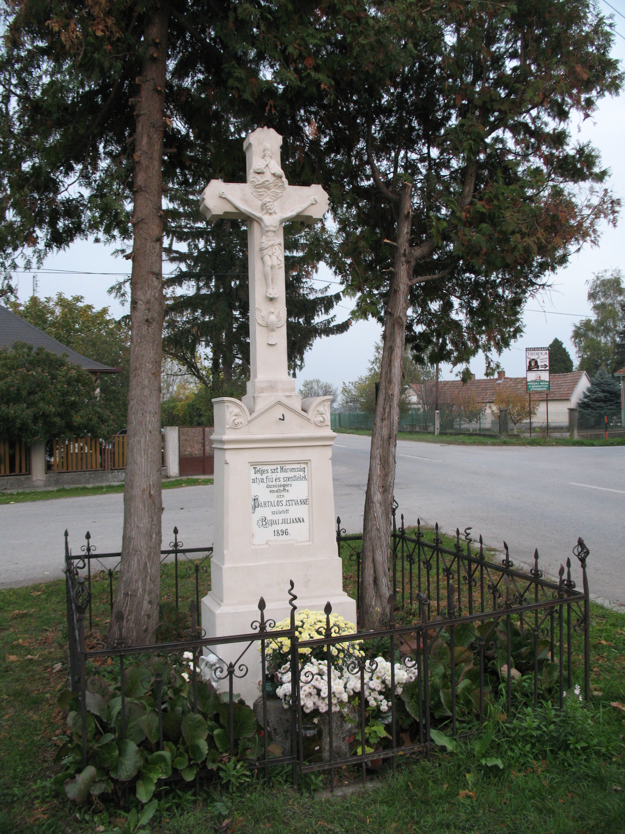 Tonkháza